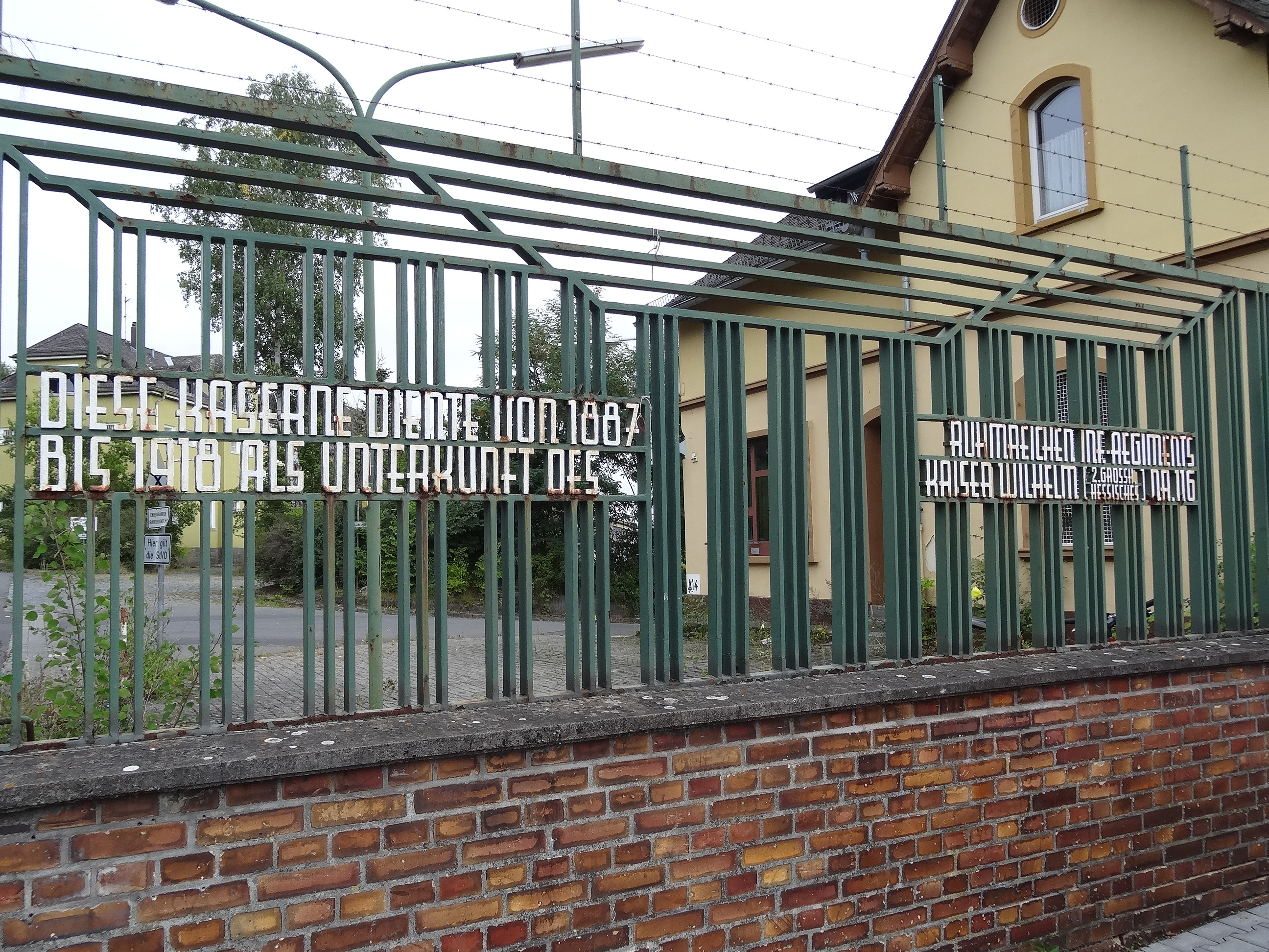 Einfahrt ehemalige Bergkaserne (Gießen)